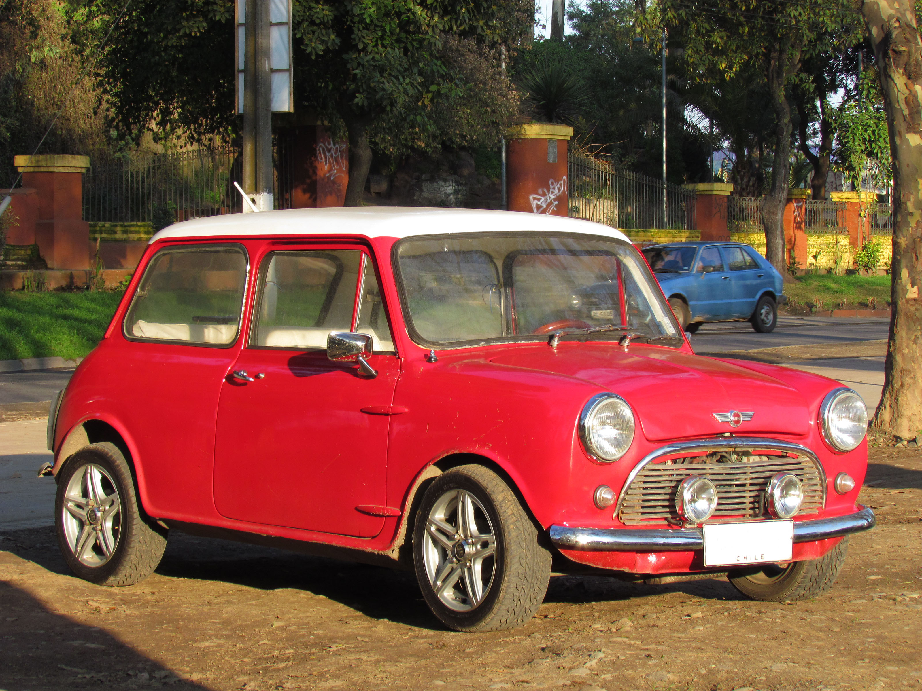 Austin Mini 1000 1973